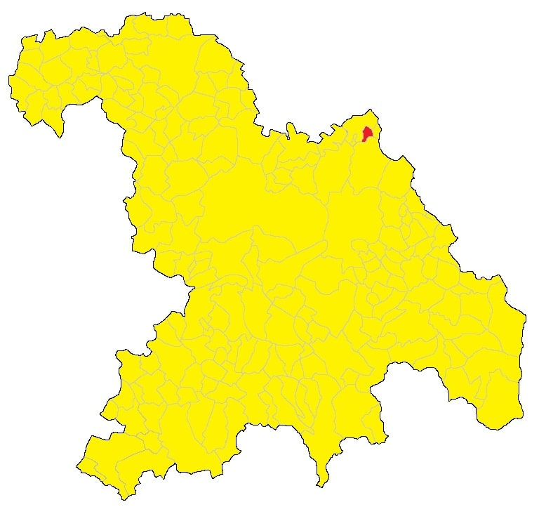 Mappa del comune di Alzano Scrivia (AL).